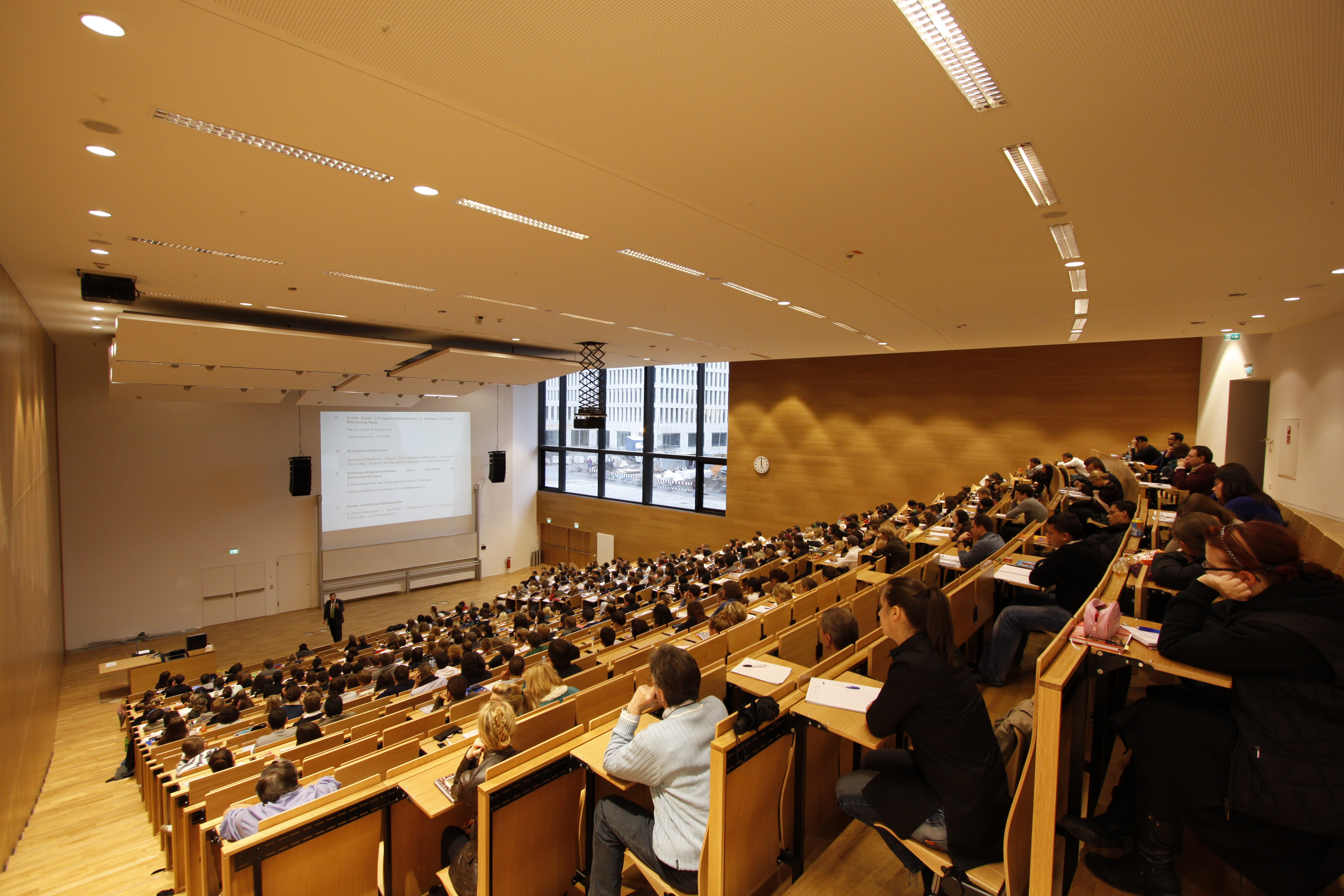 Hörsaal im Hörsaalgebäude des Campus Westend der Goethe-Universität Frankfurt